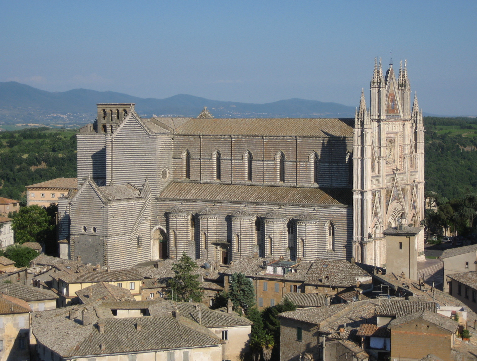 Orvieto, Umbria, Italia